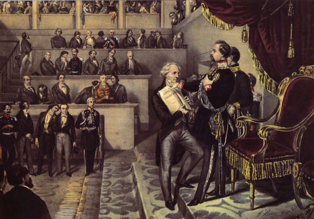 S.M. Vittorio Emanuele giura fedeltà allo Statuto Albertino nel 1849